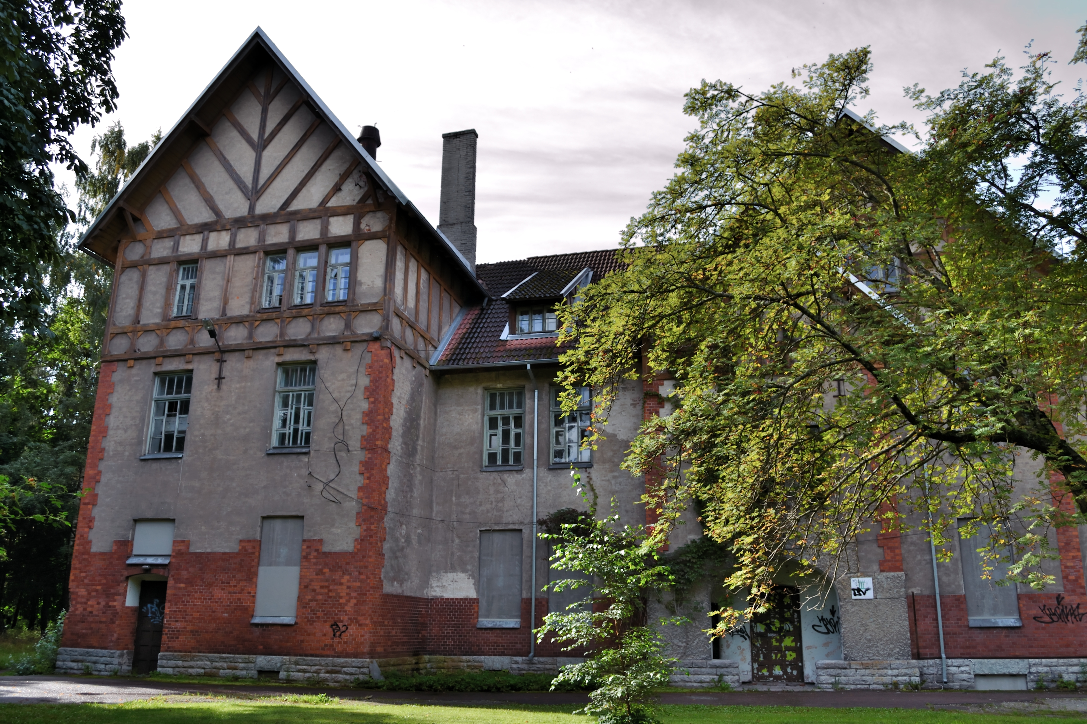 Tallinn, Seewaldi vaimuhaigla ravikorpus Paldiski mnt 52-4, 1909